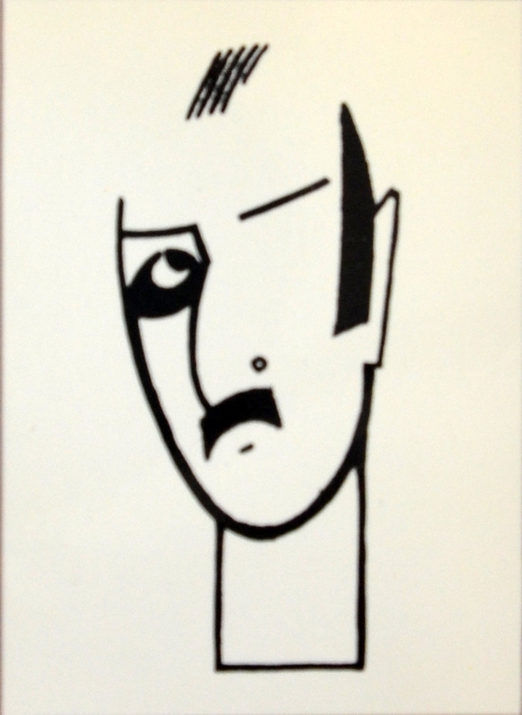 Portrait de l'architecte par sa femme (1924)